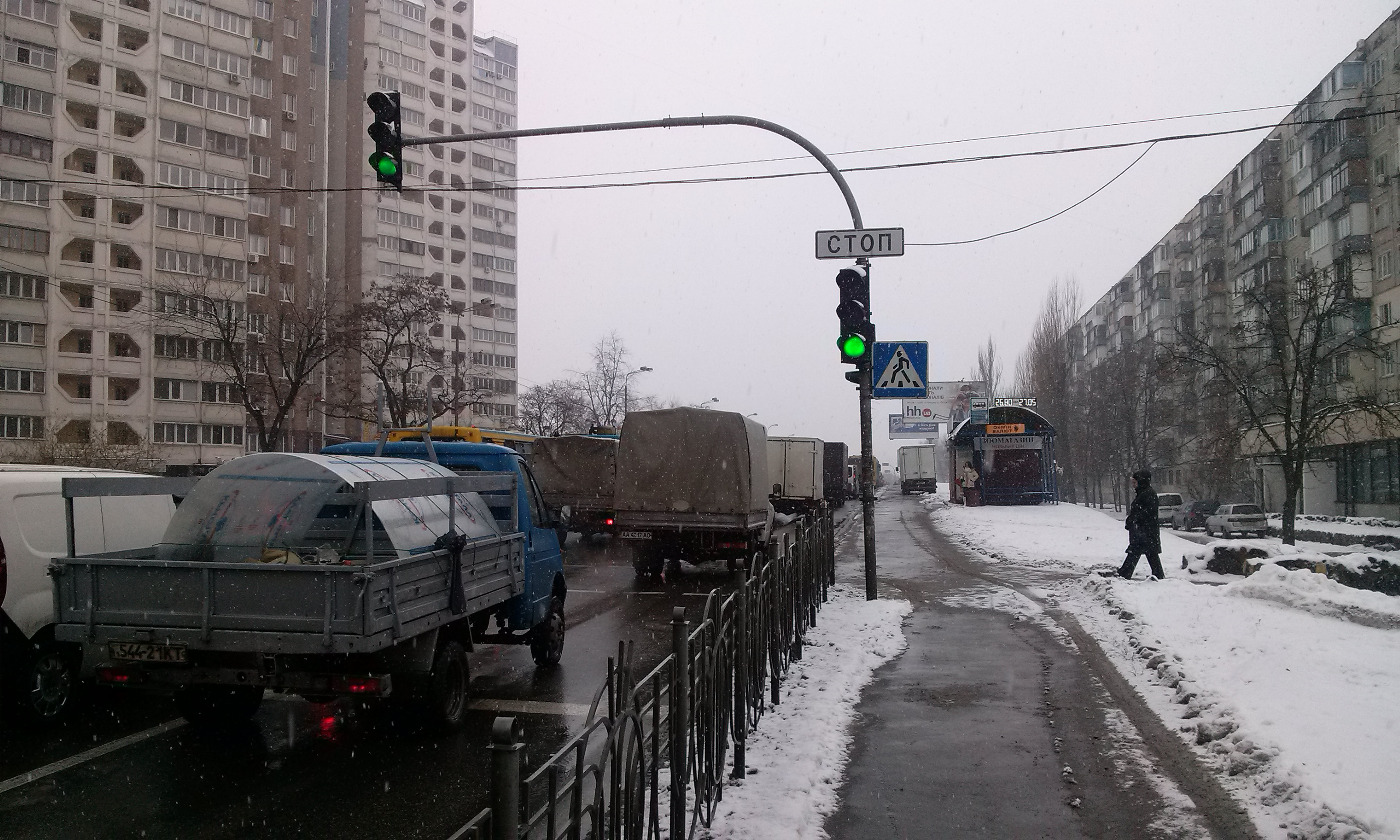 автомобильная пробка, Киев, Харьковское шоссе